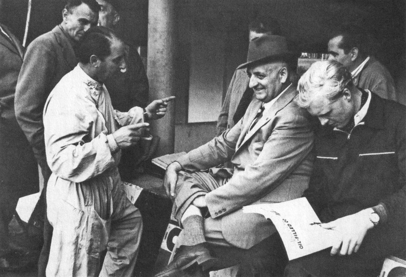 Monza, Autodromo Nazionale, 1953. Enzo Ferrari, fondatore della Scuderia Ferrari (al centro), e il suo pilota, l'inglese Mike Hawthorn (a destra), in un momento di relax nei box del circuito.